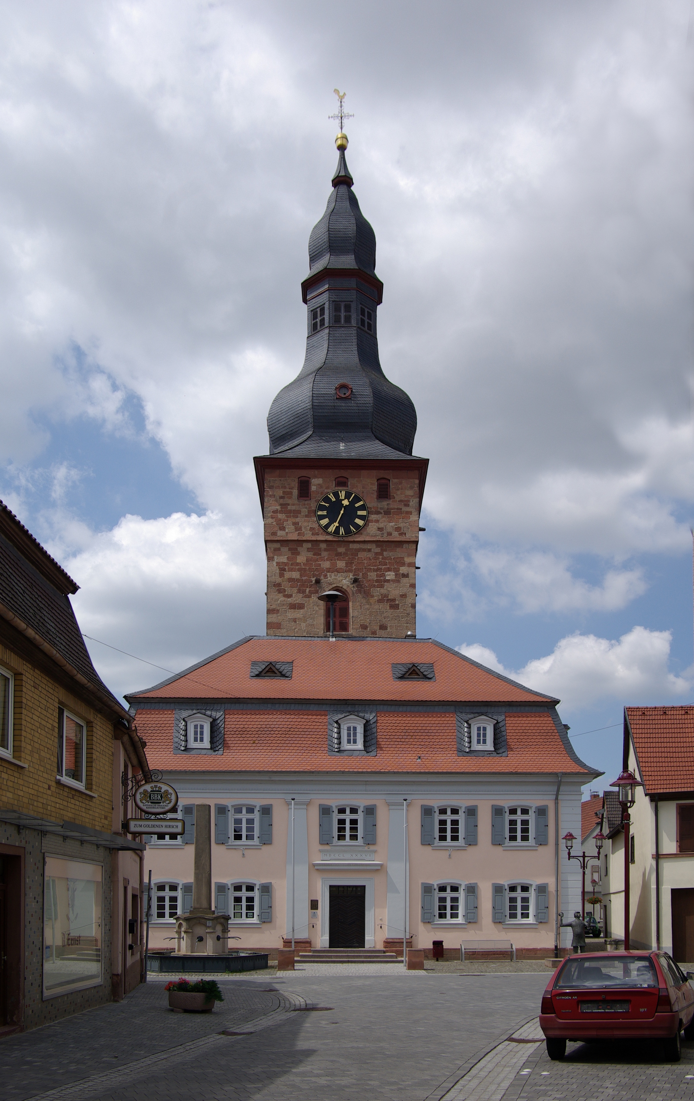 Göllheim, Hauptstraße 39: Rathaus; frühklassizistischer Mansardwalmdachbau, bezeichnet 1786, Architekt Johann Jost Sebastian, Dreisen; ortsbildprägend; auf dem Vorplatz klassizistischer Laufbrunnen, um 1830/40. Turm: Klostergasse 2: Protestantische Pfarrkirche; spätgotischer Chorturm, 14. Jahrhundert, Obergeschoss und Haube um 1765/70